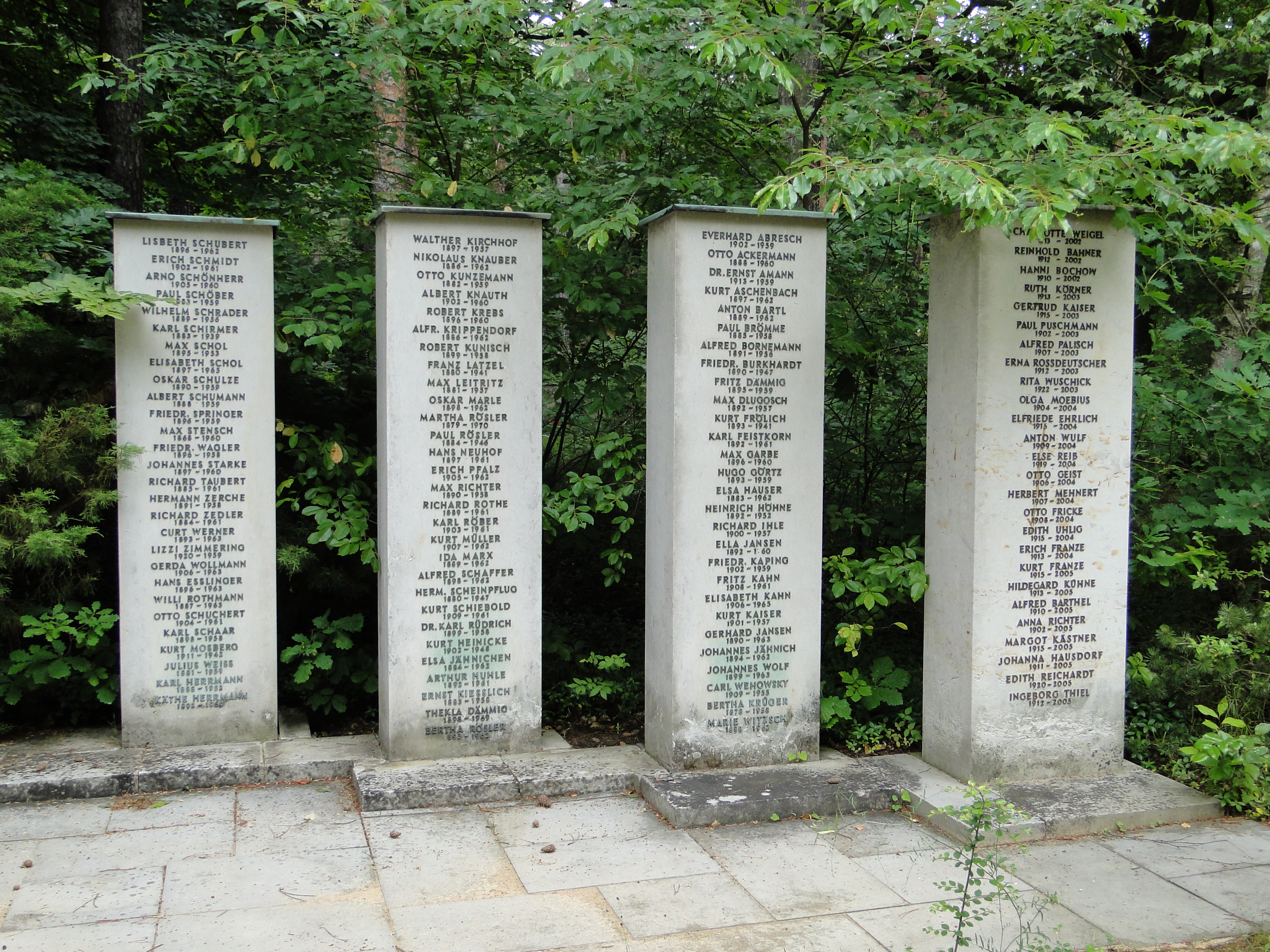 Urnengräber im Ehrenhain des Heidefriedhofs in Dresden (u.a. Franz Latzel, Kurt Frölich)